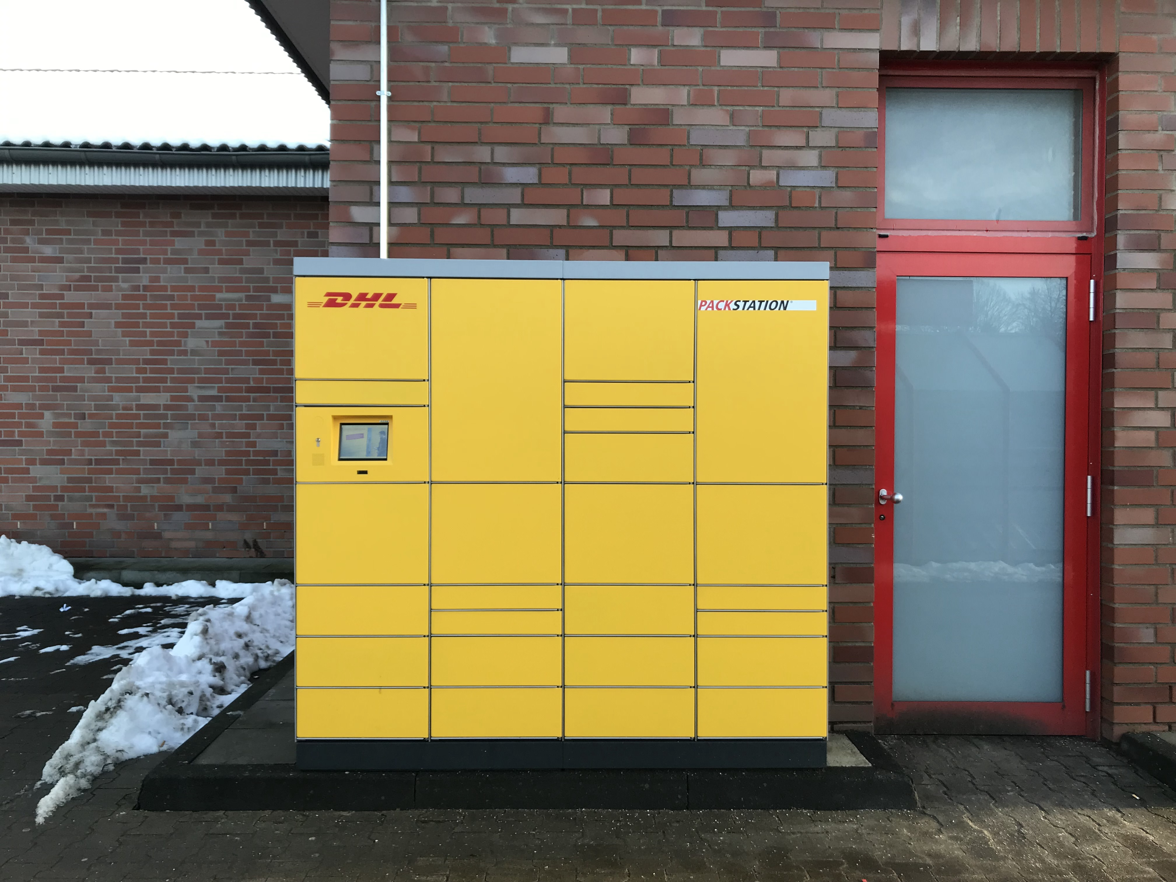 Kleine Version der DHL-Packstation an einer Tankstelle